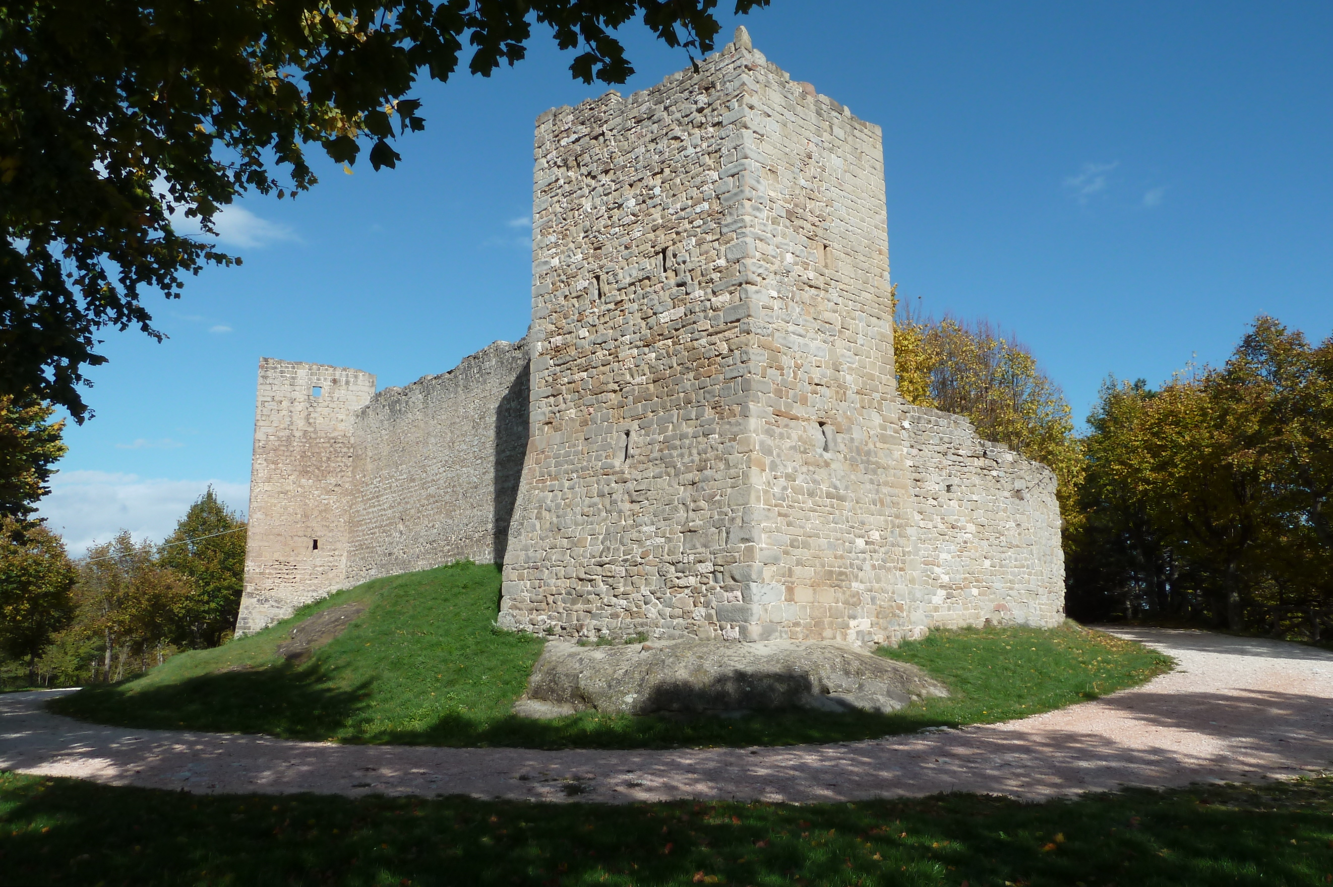 Torrioni delle antiche mura castellane di Montemonaco (Ascoli Piceno)